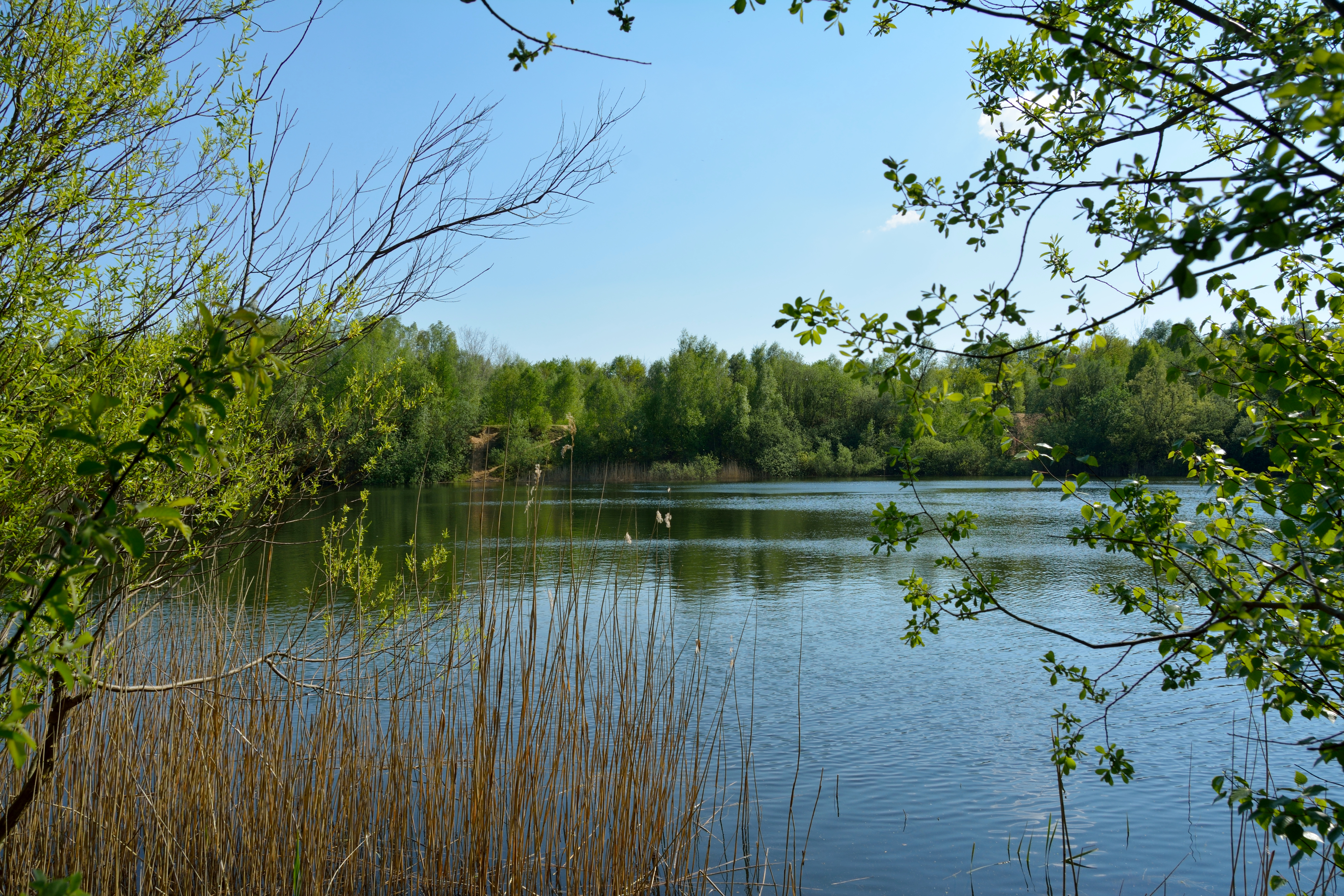 Impressionen aus dem FFH-Gebiet "Reher Kratt" im Kreis Steinburg, Schleswig-Holstein